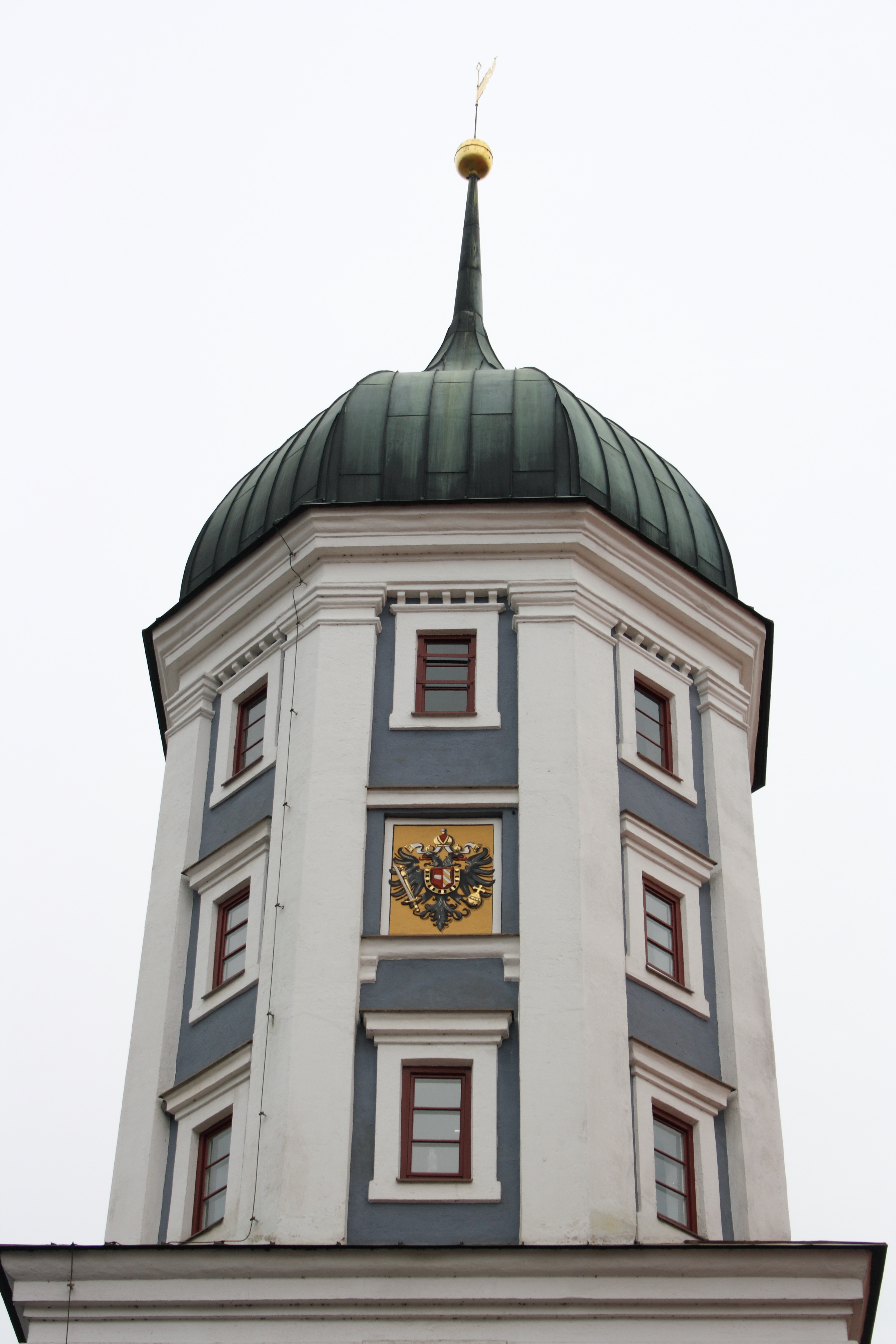 Blockhausturm in Burgau im Landkreis Günzburg (Bayern)